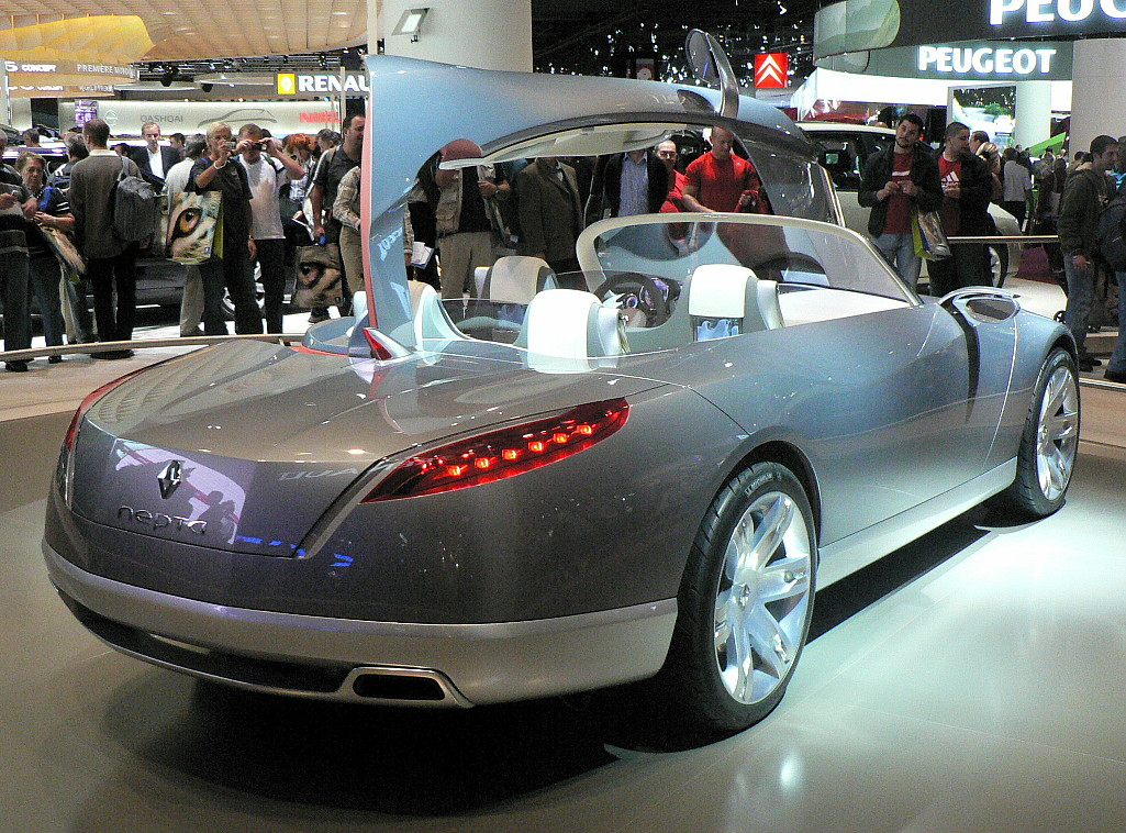 Mondial de l'automobile, Paris 2006